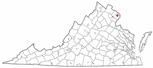 va maps